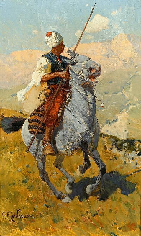 Bewaffneter Tscherkesse galoppiert auf blauem Pferd; Öl auf Leinwand; 45,5 x 28,5 cm